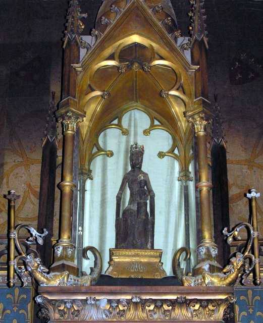 Vierge noire de Rocamadour. Photo © Roby ✉ prise le 7 octobre 2004. Licence GFDL. Grand format sur demande à l'auteur. Catégorie:Image de Rocamadour